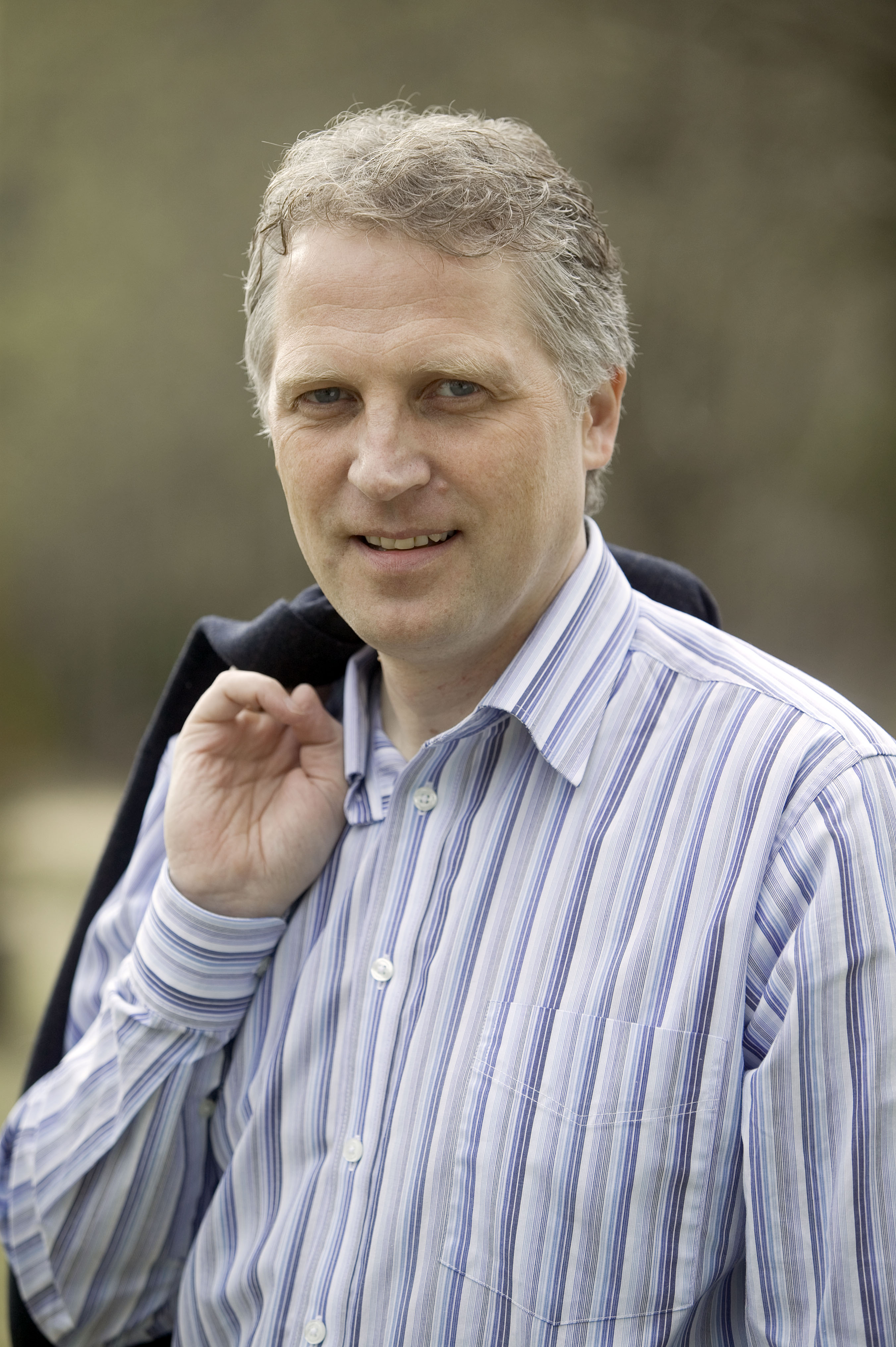 Øyvind Korsberg